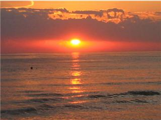 Atardecer en la Playa Portezuelo